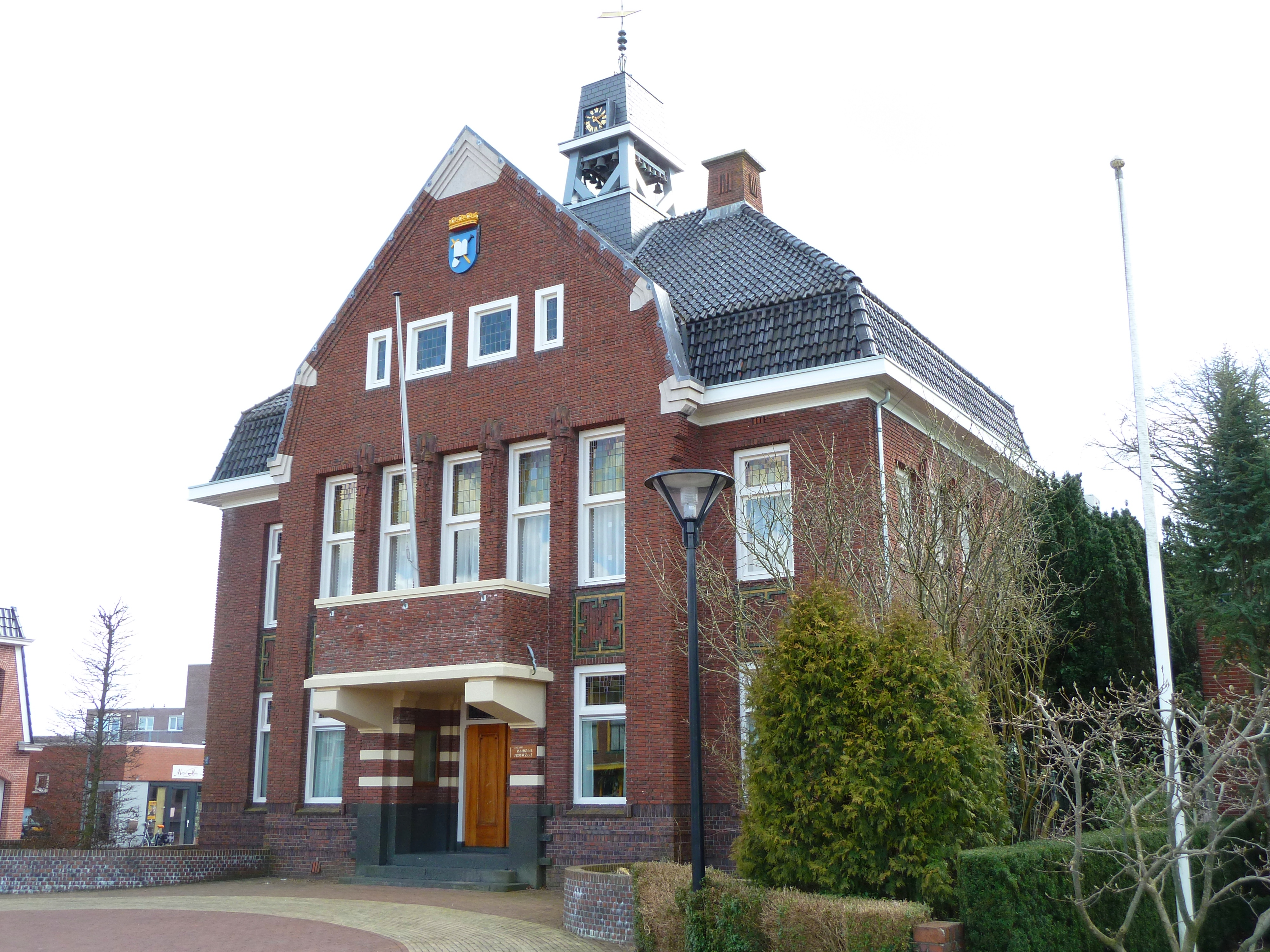 Oude deel van het gemeentehuis van Bedum. Ontworpen in 1927 door architect Gezienus Koolhof. Het nieuwe deel van het gemeentehuis erachter dateert uit 1975, toen ook het carillon in de dakruiter werd vervangen door een nieuwe.